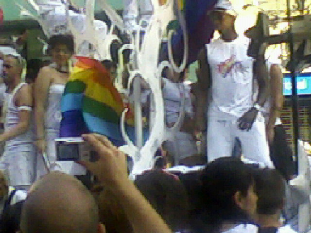 Foto de la carrossa del Grupo Arena durant el Pride Barcelona 2009